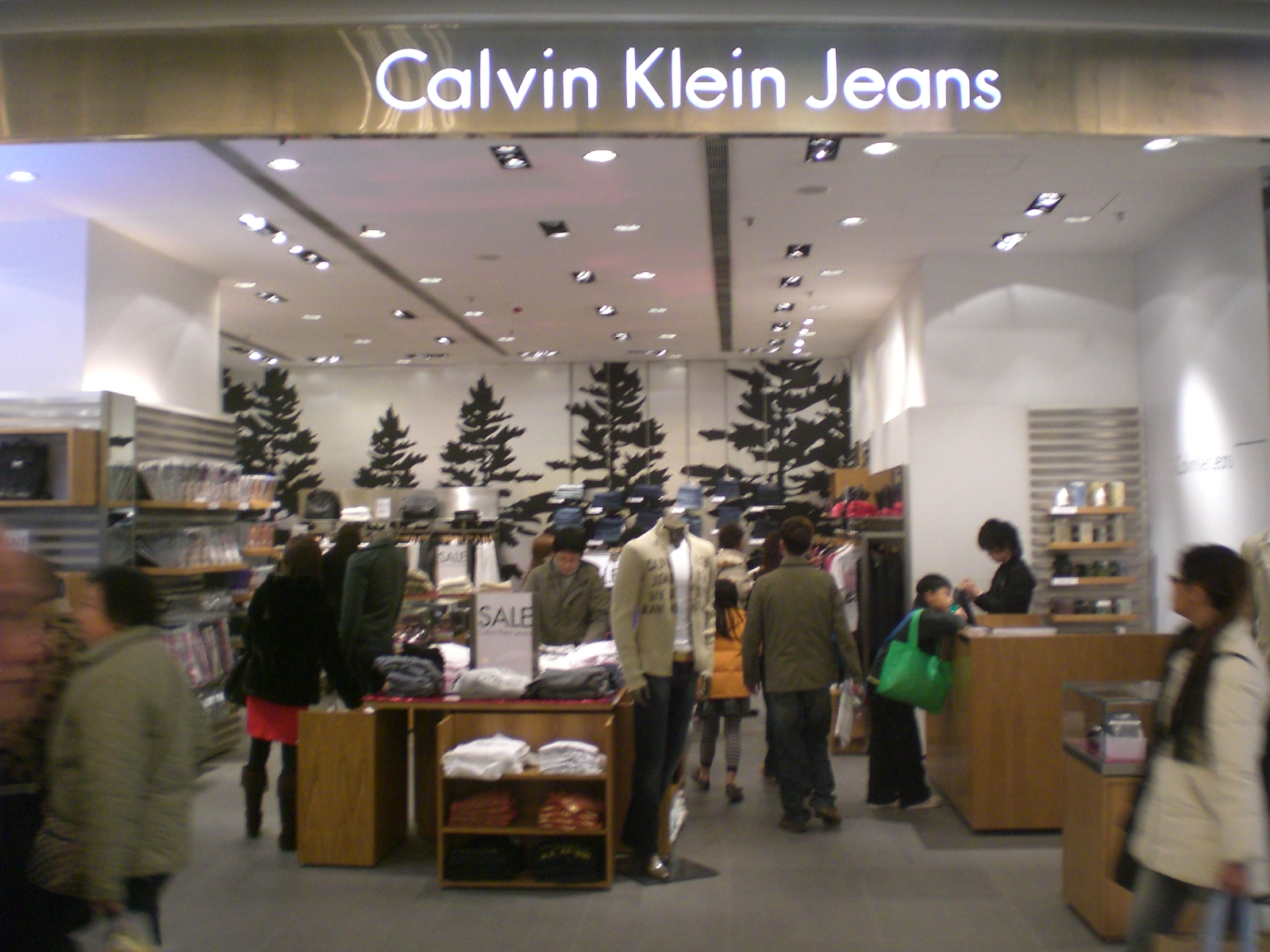 觀塘創紀之城5期東亞銀行中心卡文·克萊（Calvin Klein）店